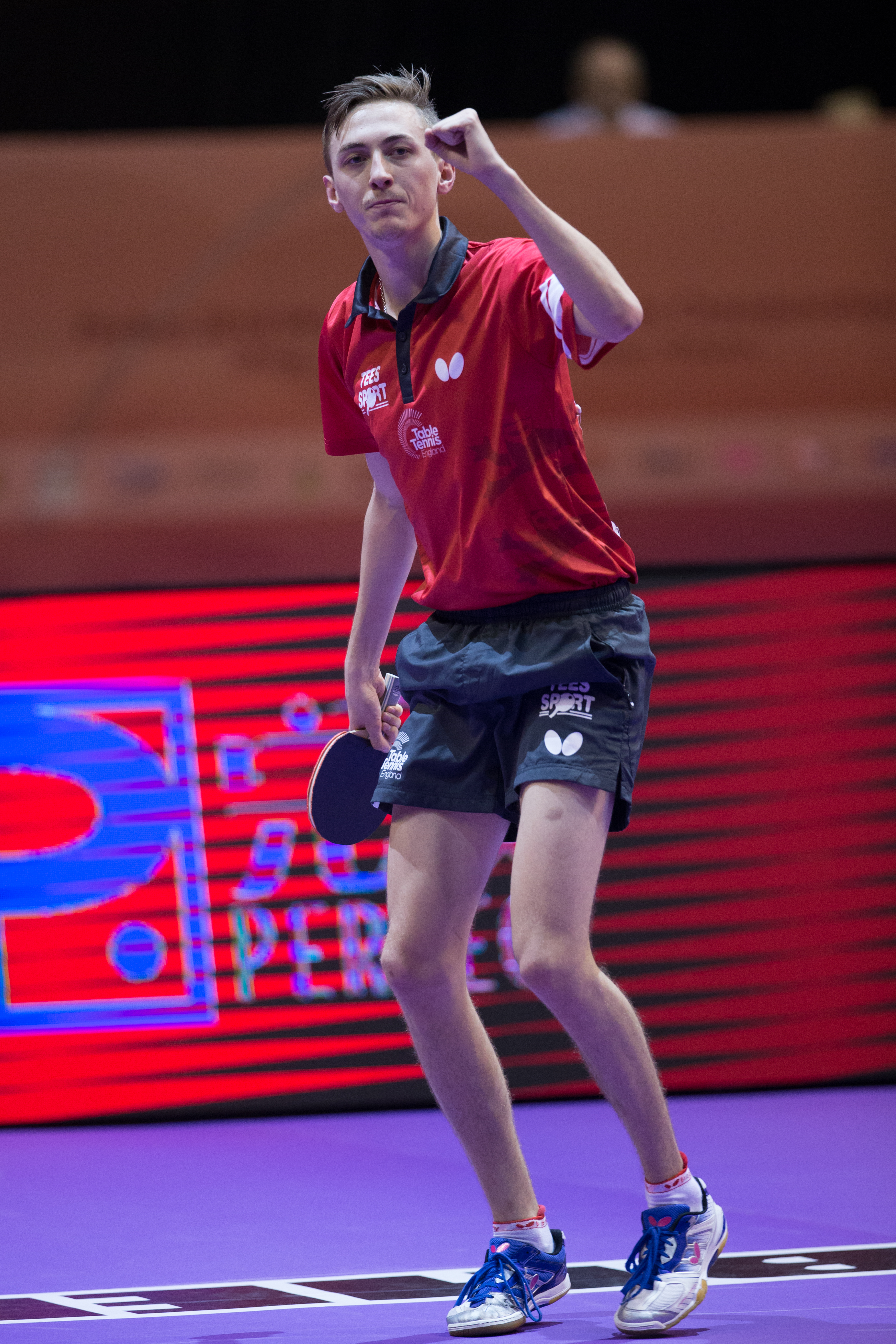 _K0K5731